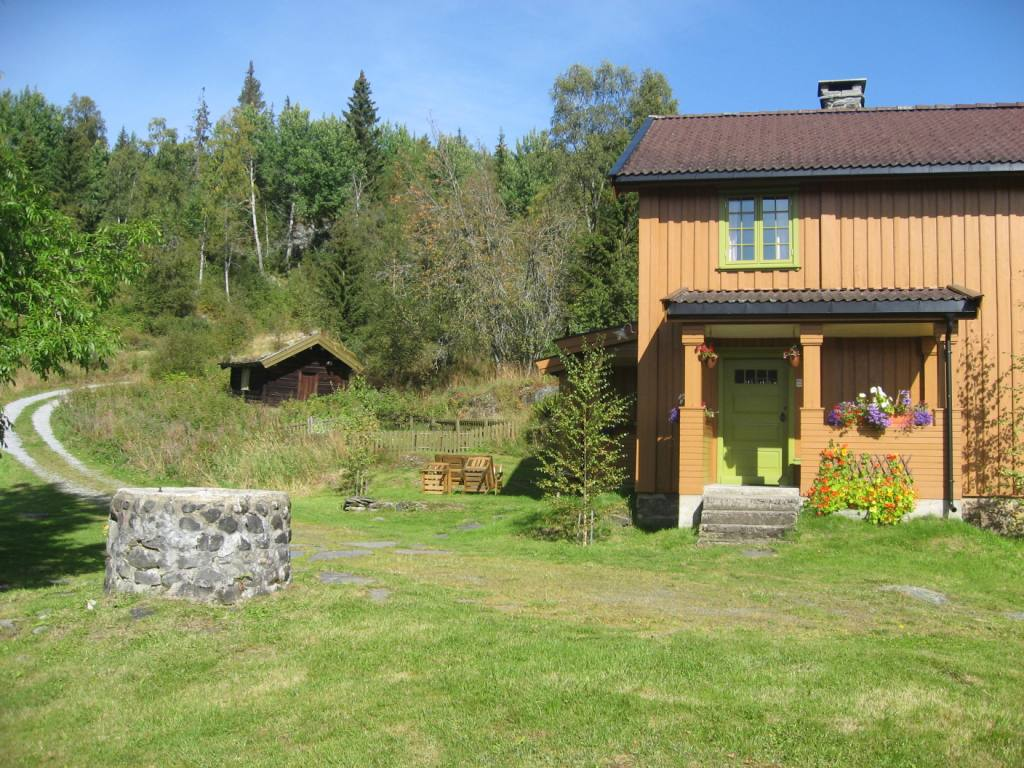 Midtbø in Vinje, home of norwegian novelist Tarjei Vesaas and poet Halldis Moren Vesaas